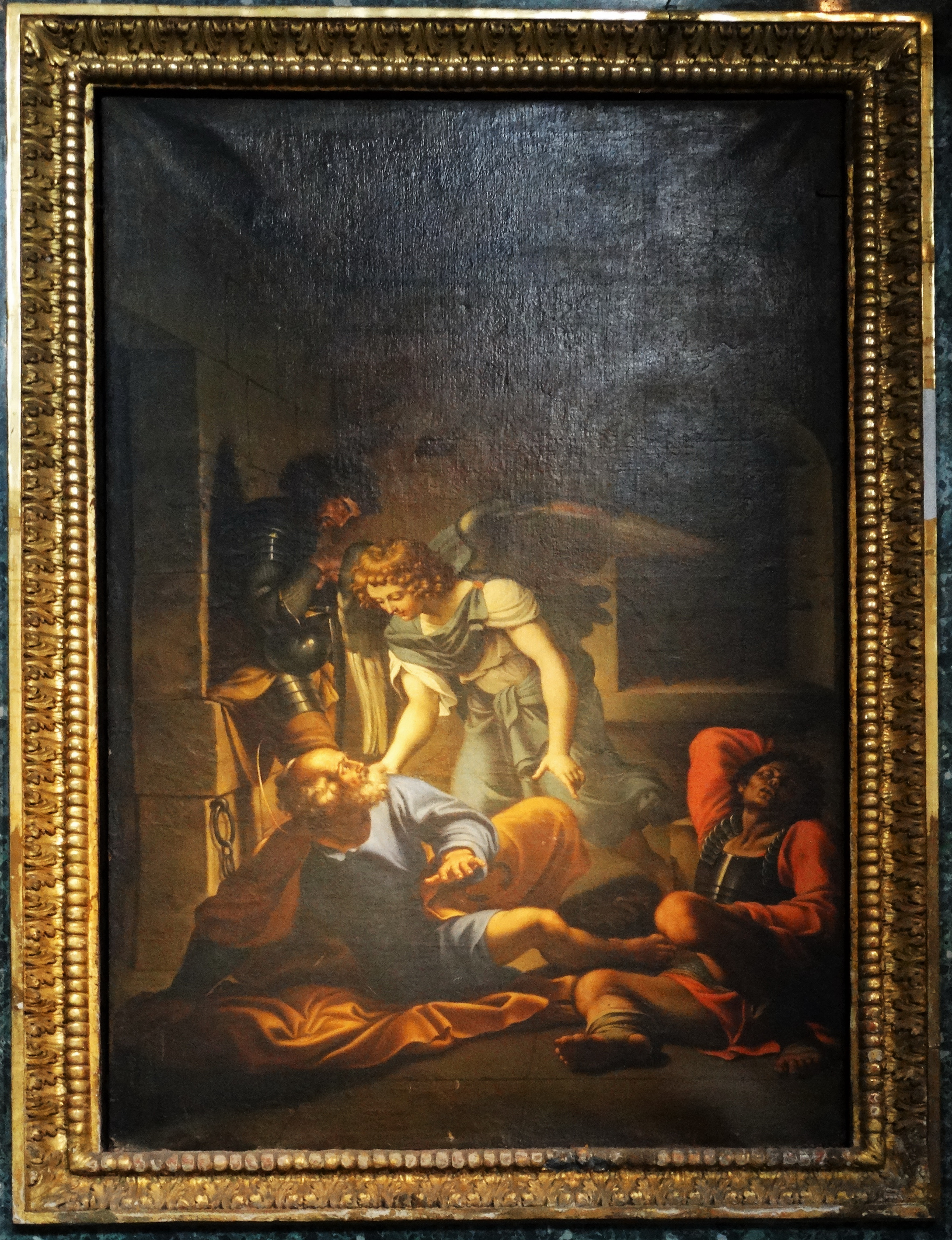 Copia della "Liberazione di Pietro del Domenichino" di Pietro Santi Bartoli 1683